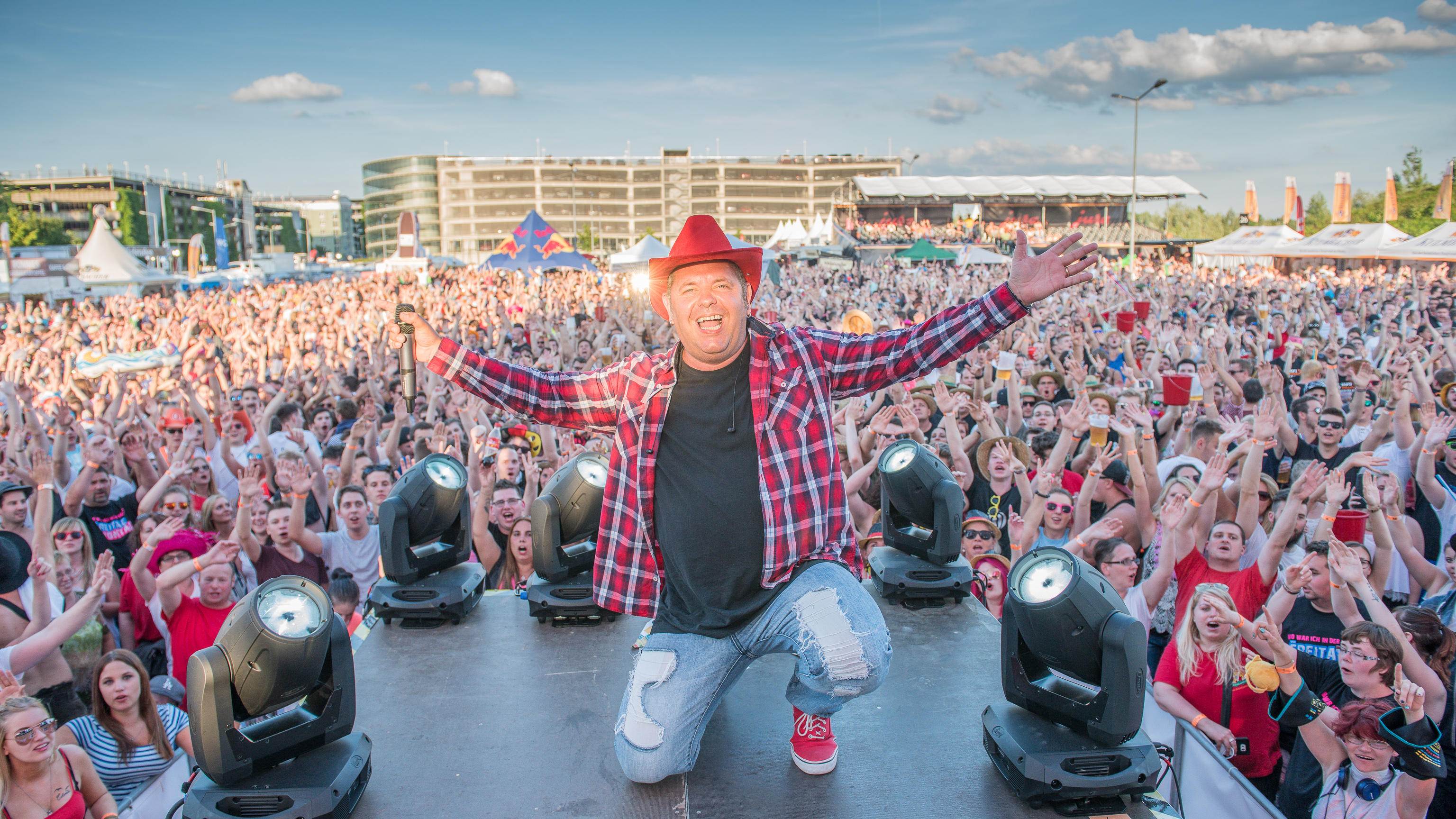 Konzert,Livekonzert,Livemusik,Markus Becker,Musik,Radio N1,Super Sommer Sause 2016,Werk B Events